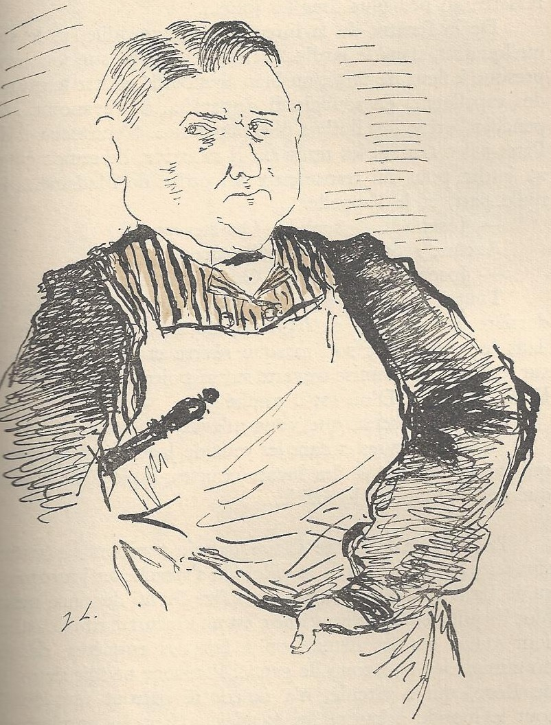 Illustration de Jean Launois (1898-1942), pour « Le Journal d’une femme de chambre », roman d’Octave Mirbeau (1848-1917). Éditions Nationales, 1935.